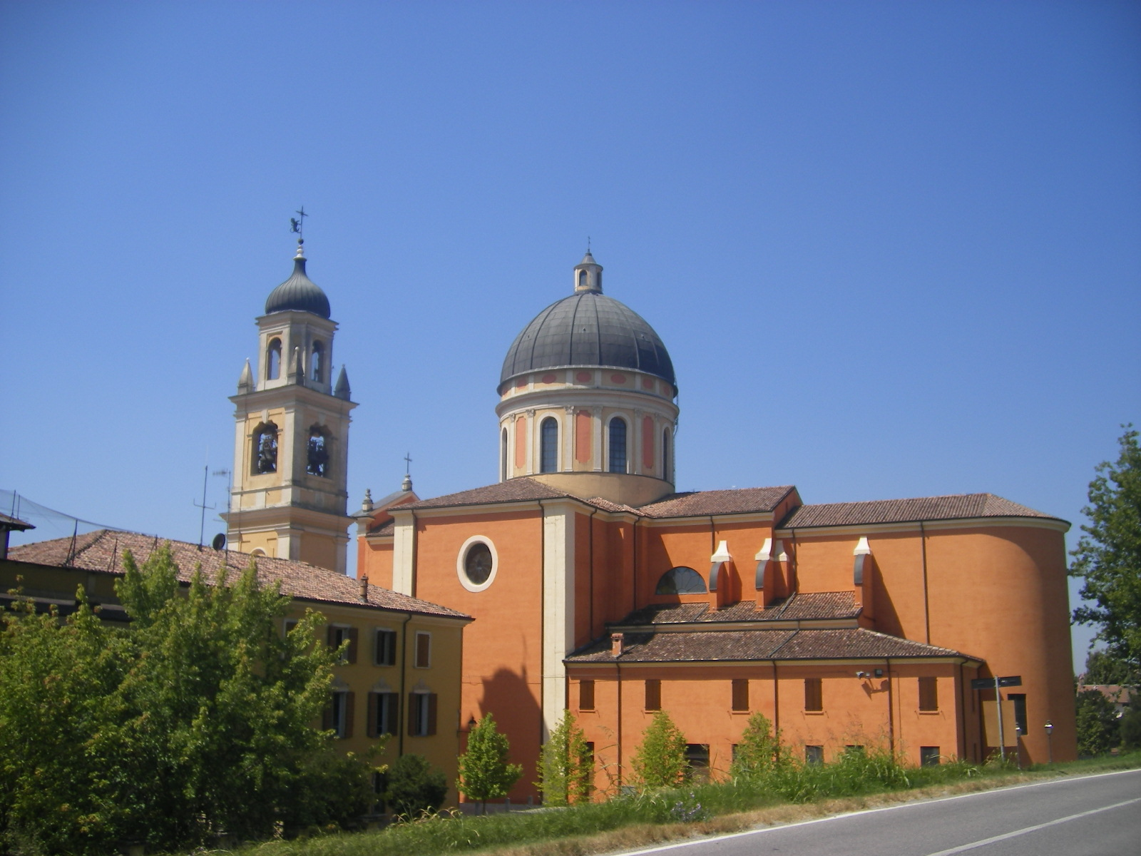 Boretto